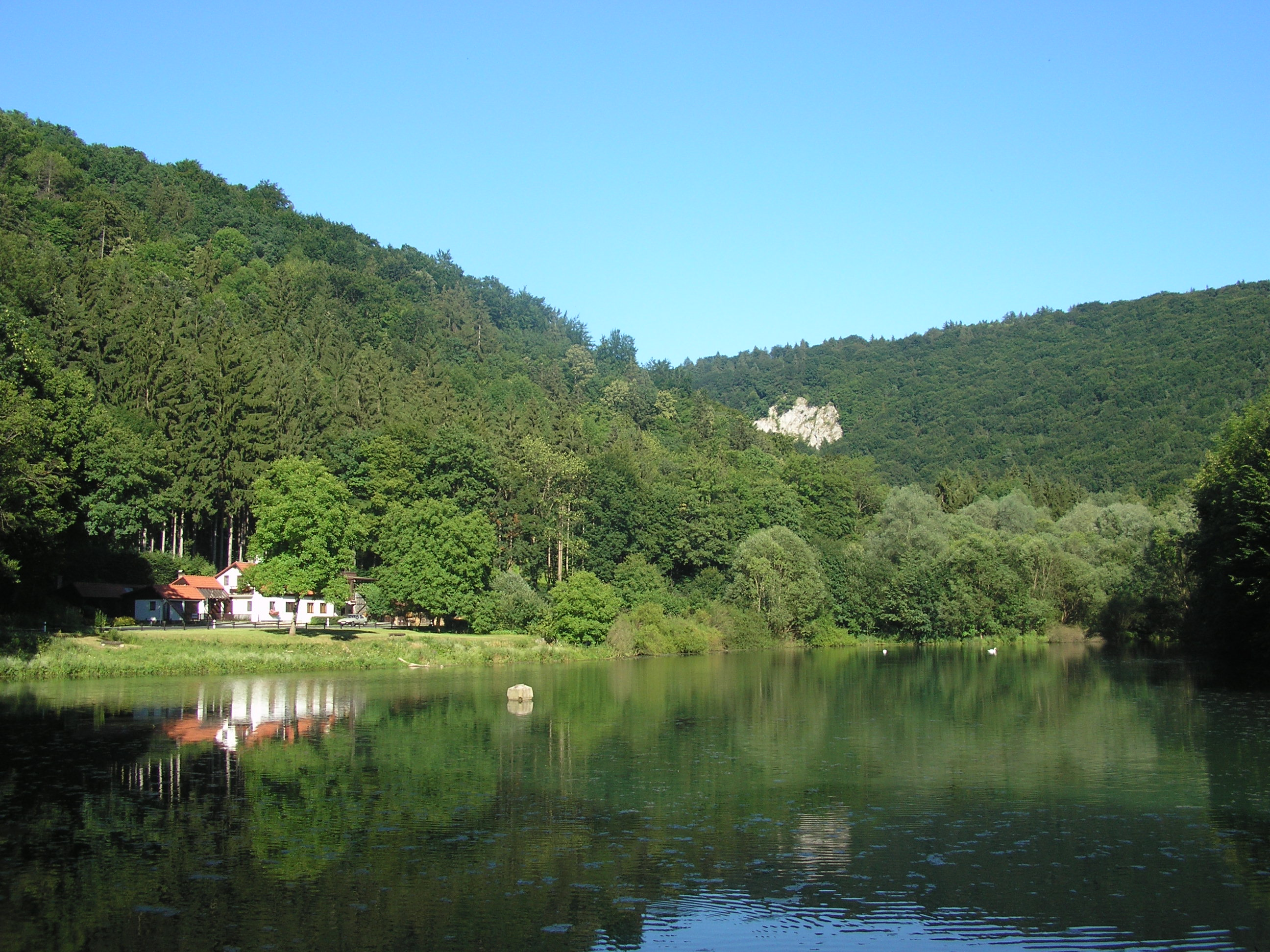 Jakubovo jezero ležící na říčce Punkva v Moravském krasu